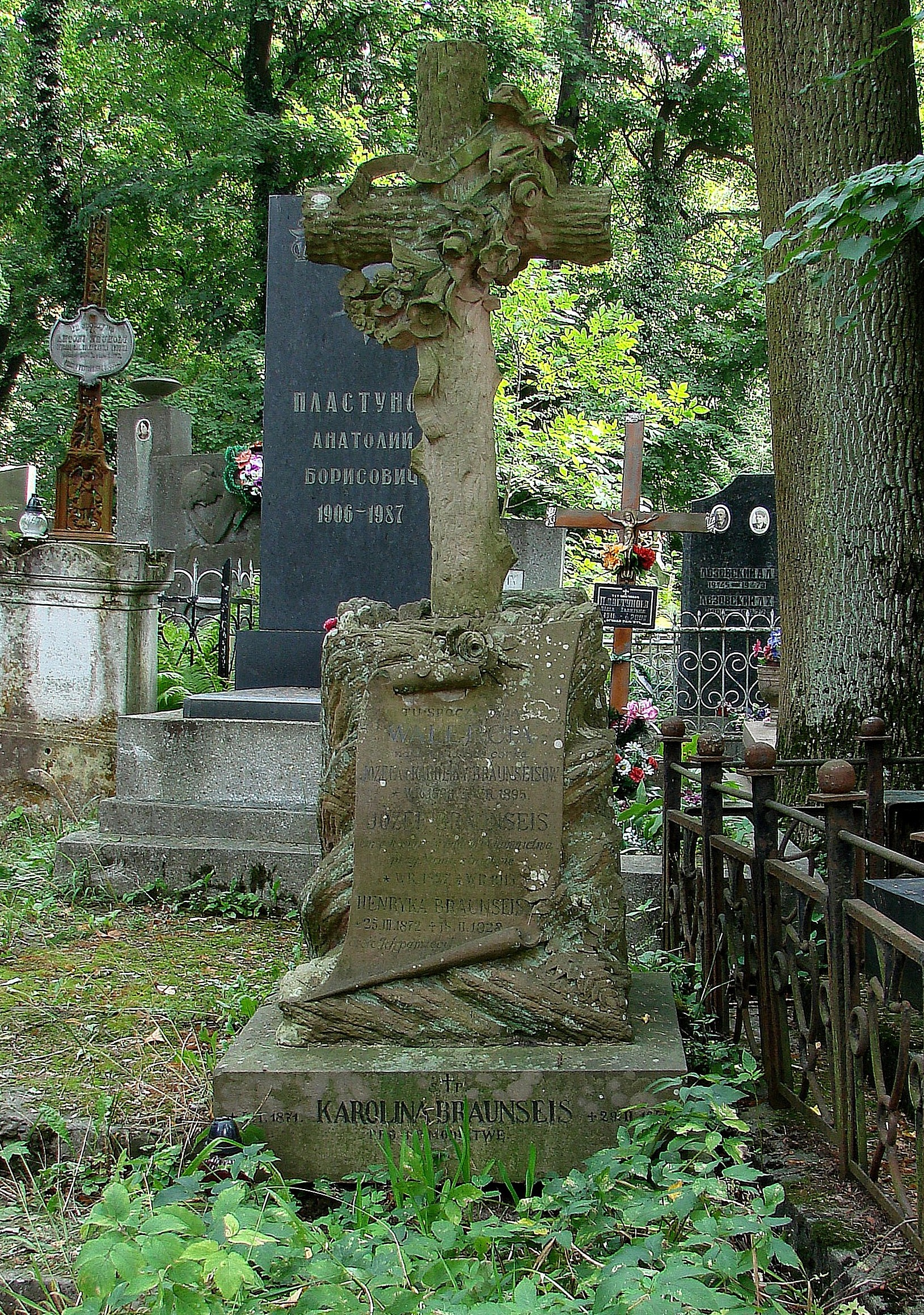 Пам'ятник на могилі арх.Йозефа Браунзайса.Личаківський цвинтар , поле № 13.